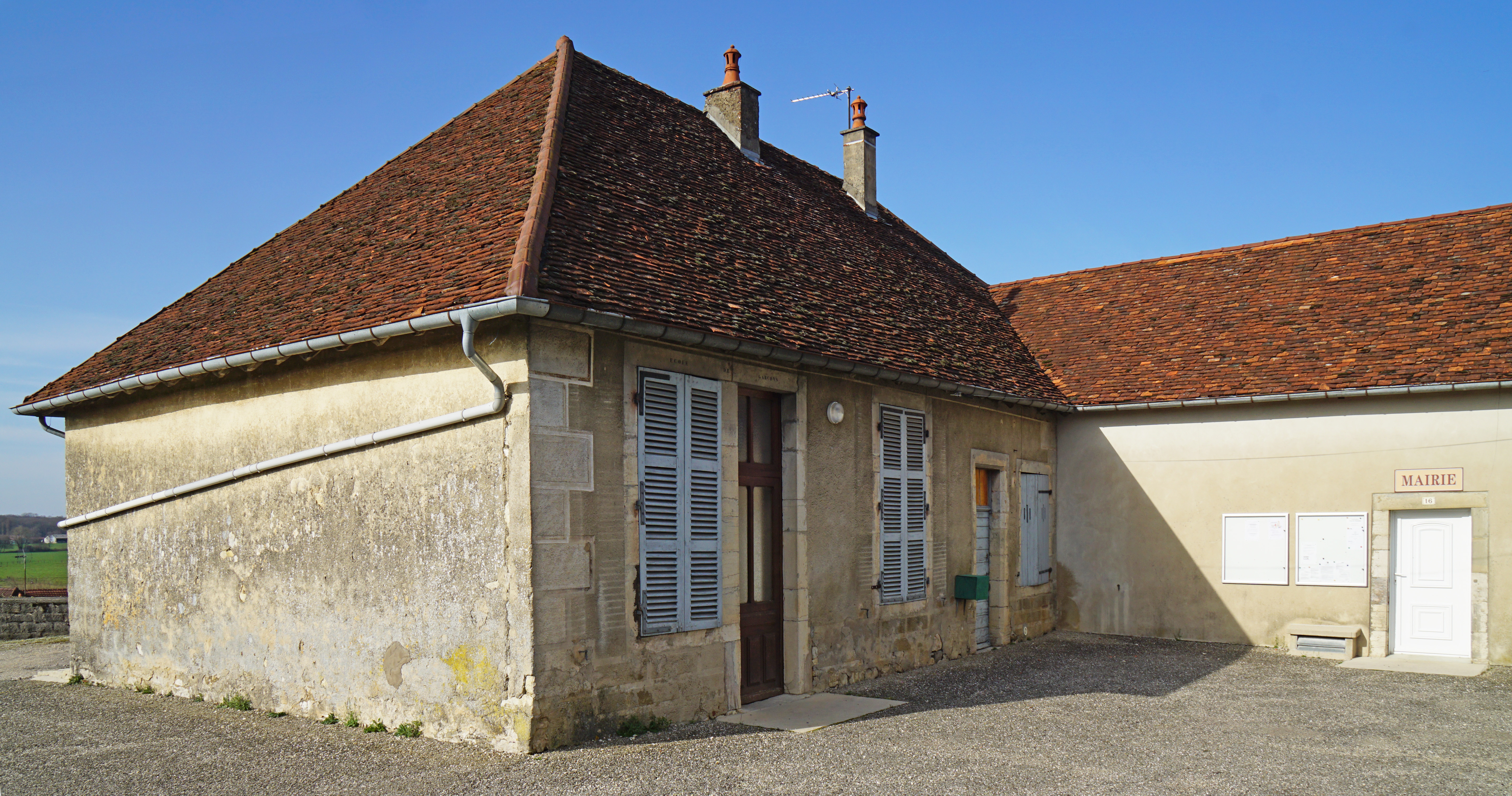 La maire-école de Tourmont.